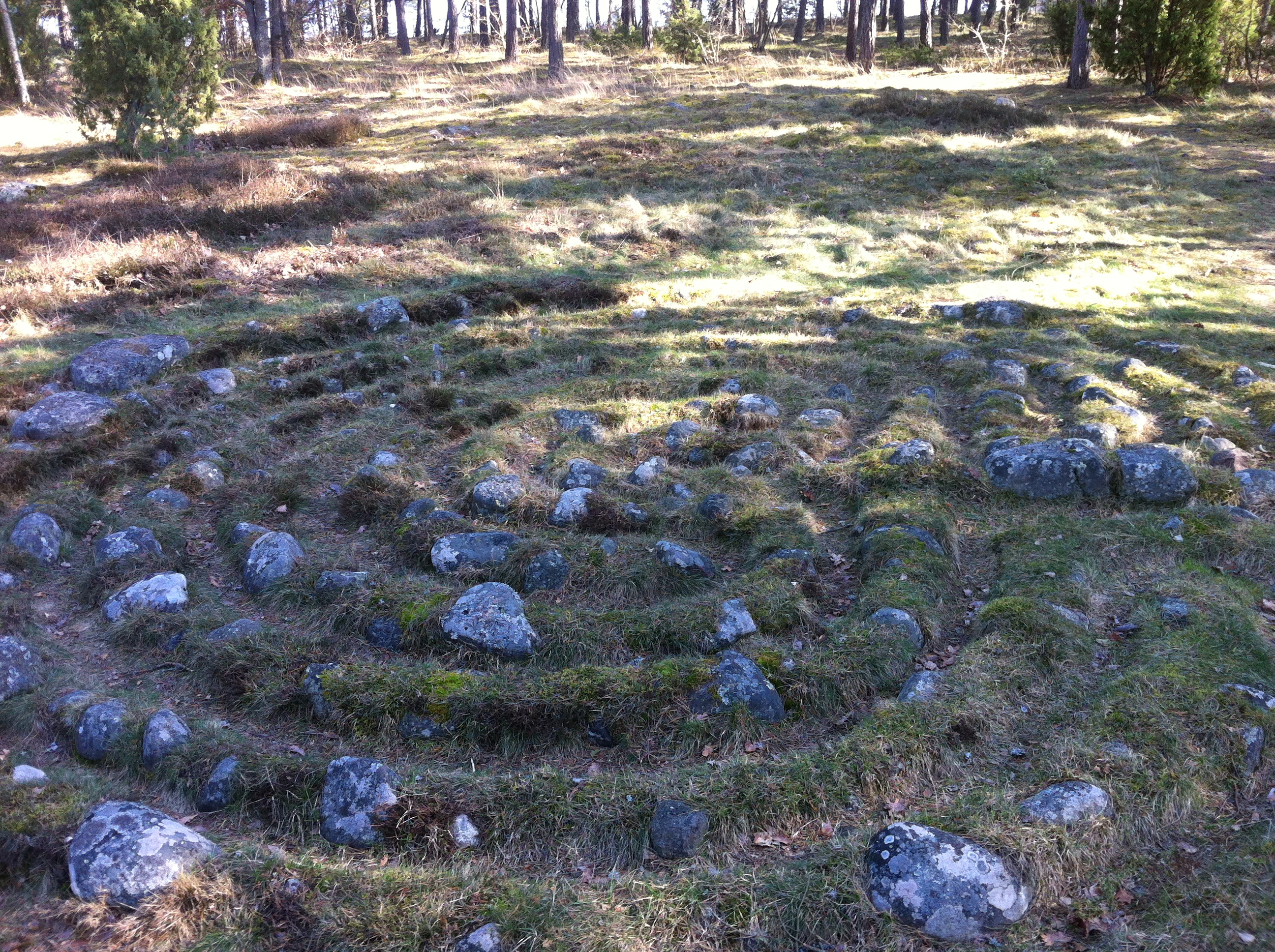 Labyrint, Ålems sn, Kalmar län, ingår i RAÄ Ålem 8:1